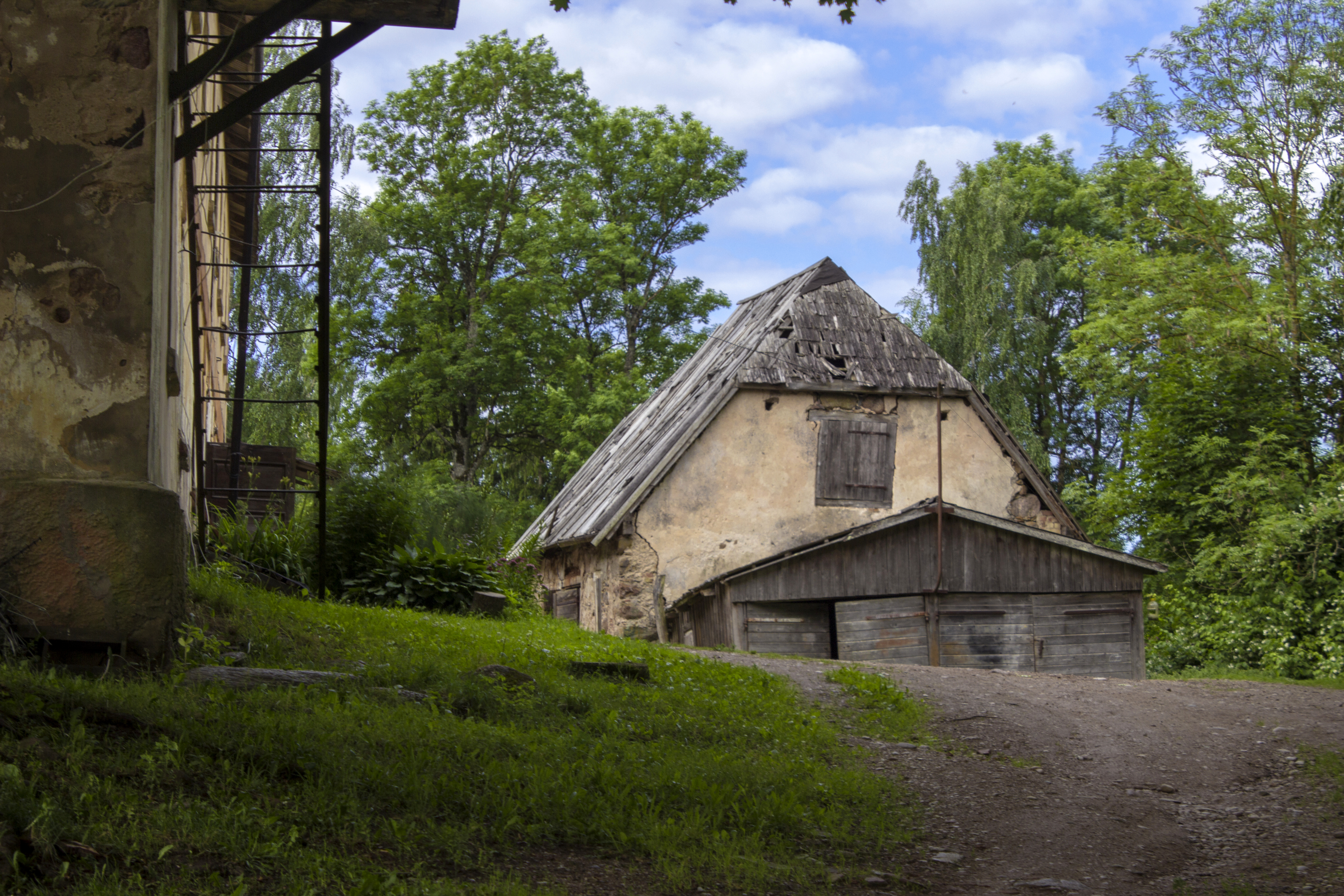 Snapju muiža / manor